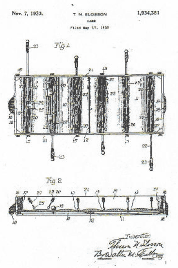 futbol de mesa 1934